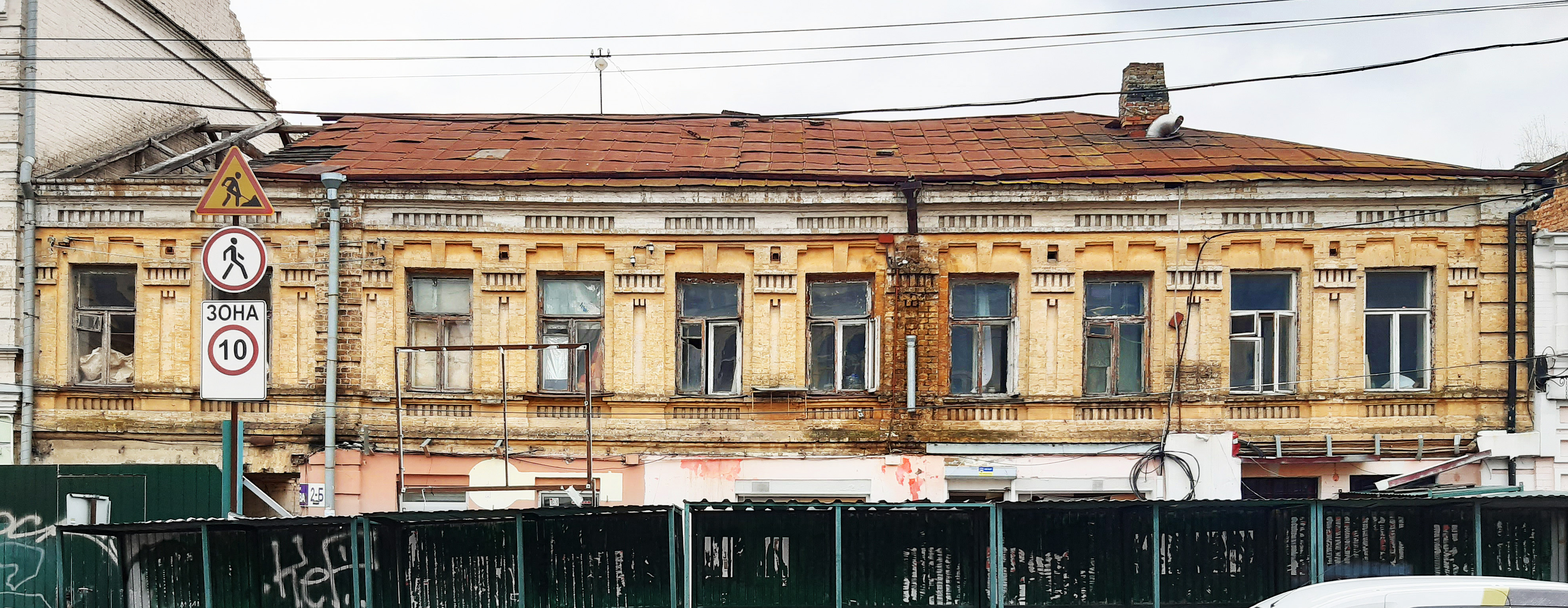 Садиба міська, Київ, Хорива вул., 2